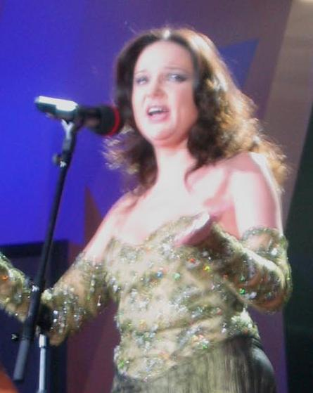 Alenka Gotar, Slovene soprano singer